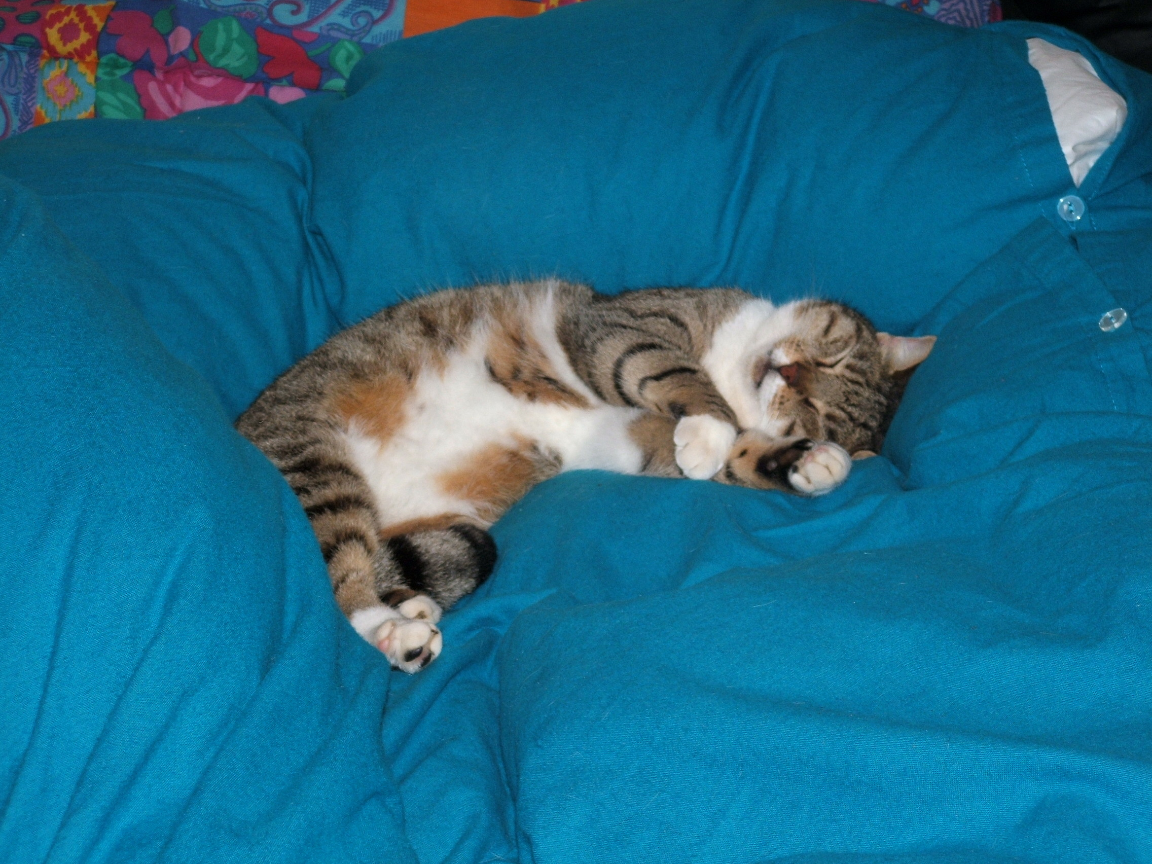 החתולה מיציבוץ מקיבוץ בית אורן